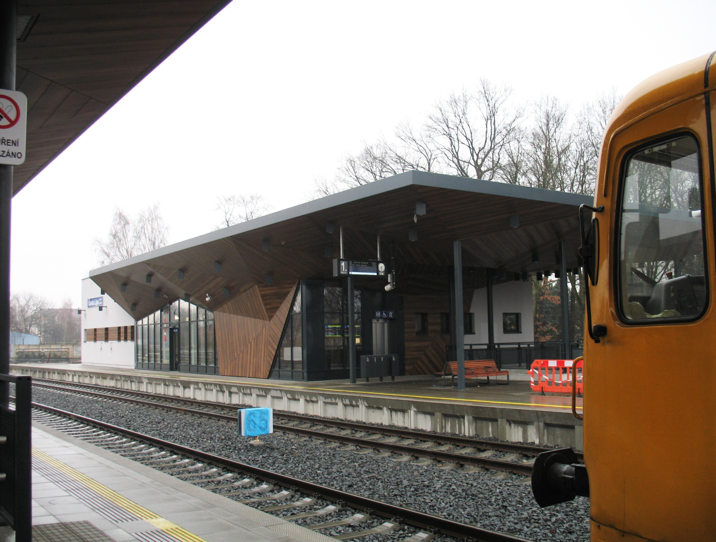 Nové hlavní nádraží v České Lípě bylo otevřeno v sobotu 17. 12. 2013